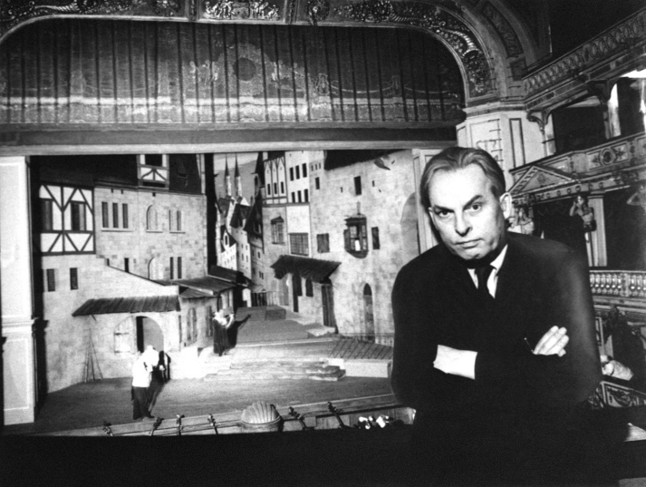 Arbeit am Bühnenbild zur Oper "Die Meistersinger von Nürnberg" im Theater an der Wien (Ausweichspielstätte der Wiener Staatsoper). Kautsky vor dem fertigen Bühnenbild.